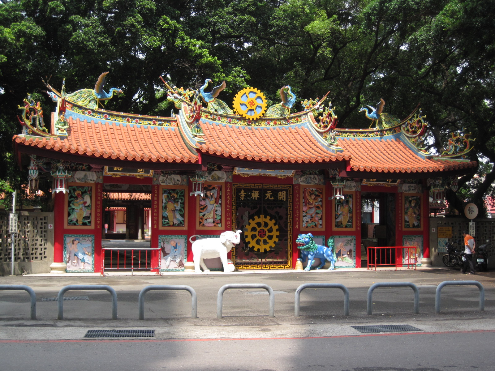 臺南開元寺山門